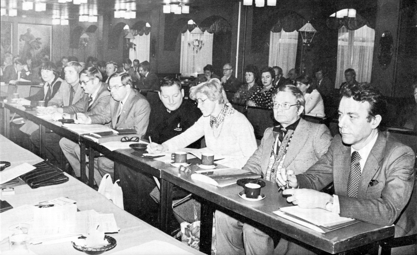 Årsmøte i Troms Ap i 1979, lengst til høyre partiets daværende leder Reiulf Steen